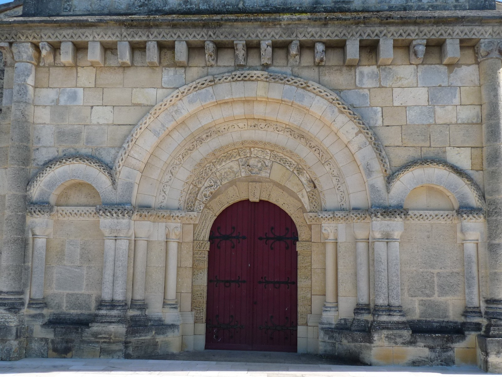 Eglise de Cubnezais (façade classée), Gironde, France